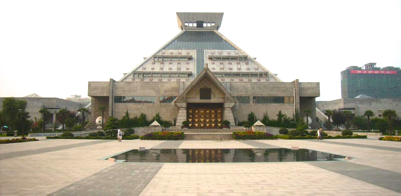 User:Baiqitun摄于2005年8月3日。